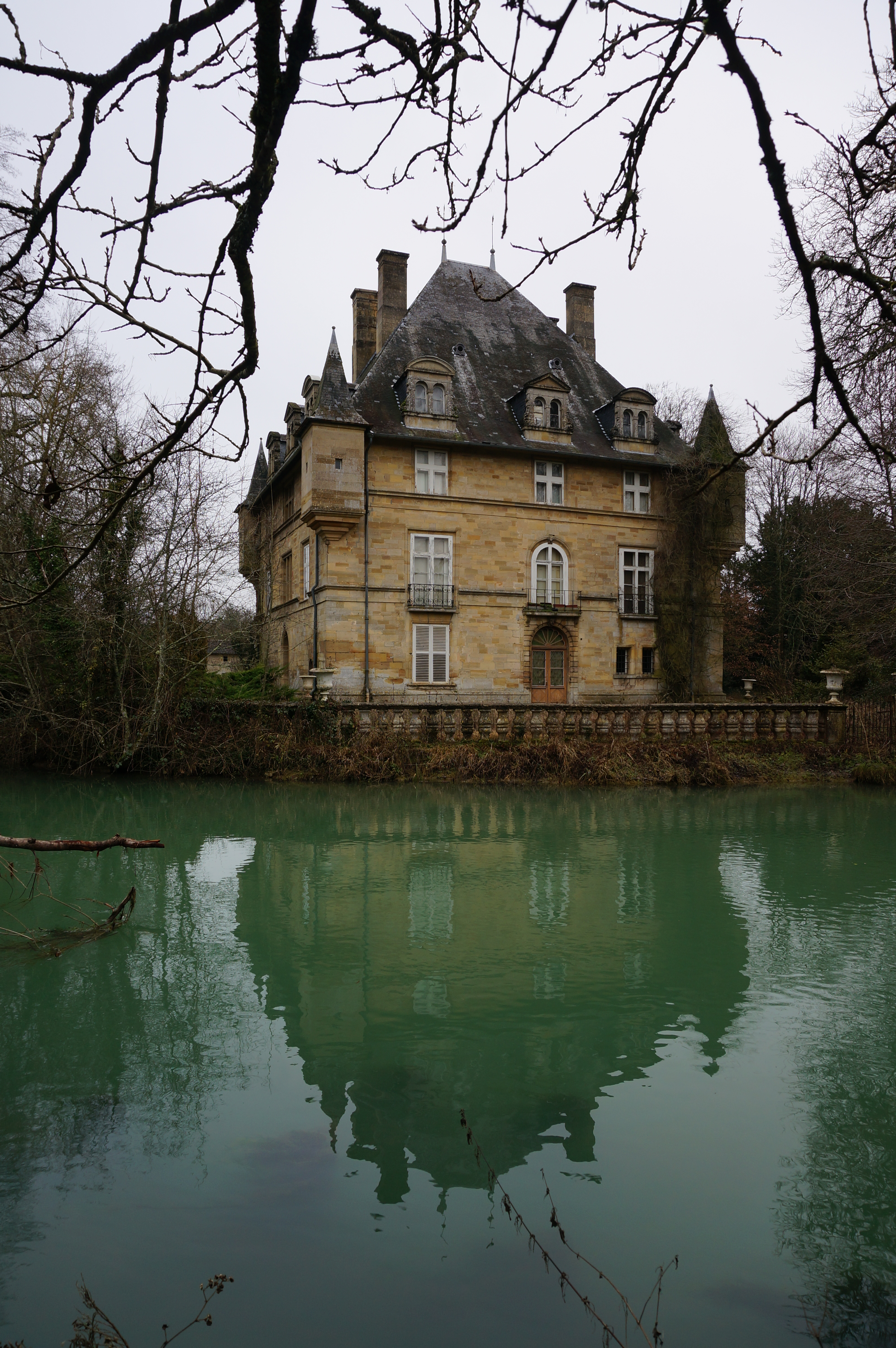 vues à Ville-sur-Saulx.